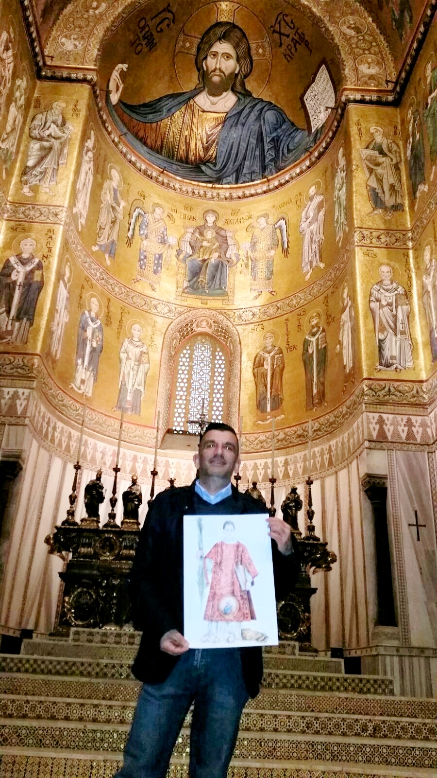 Duomo di Monreale, Esposizione dell'icona di S. Cesario diacono e martire sull'altare maggiore.